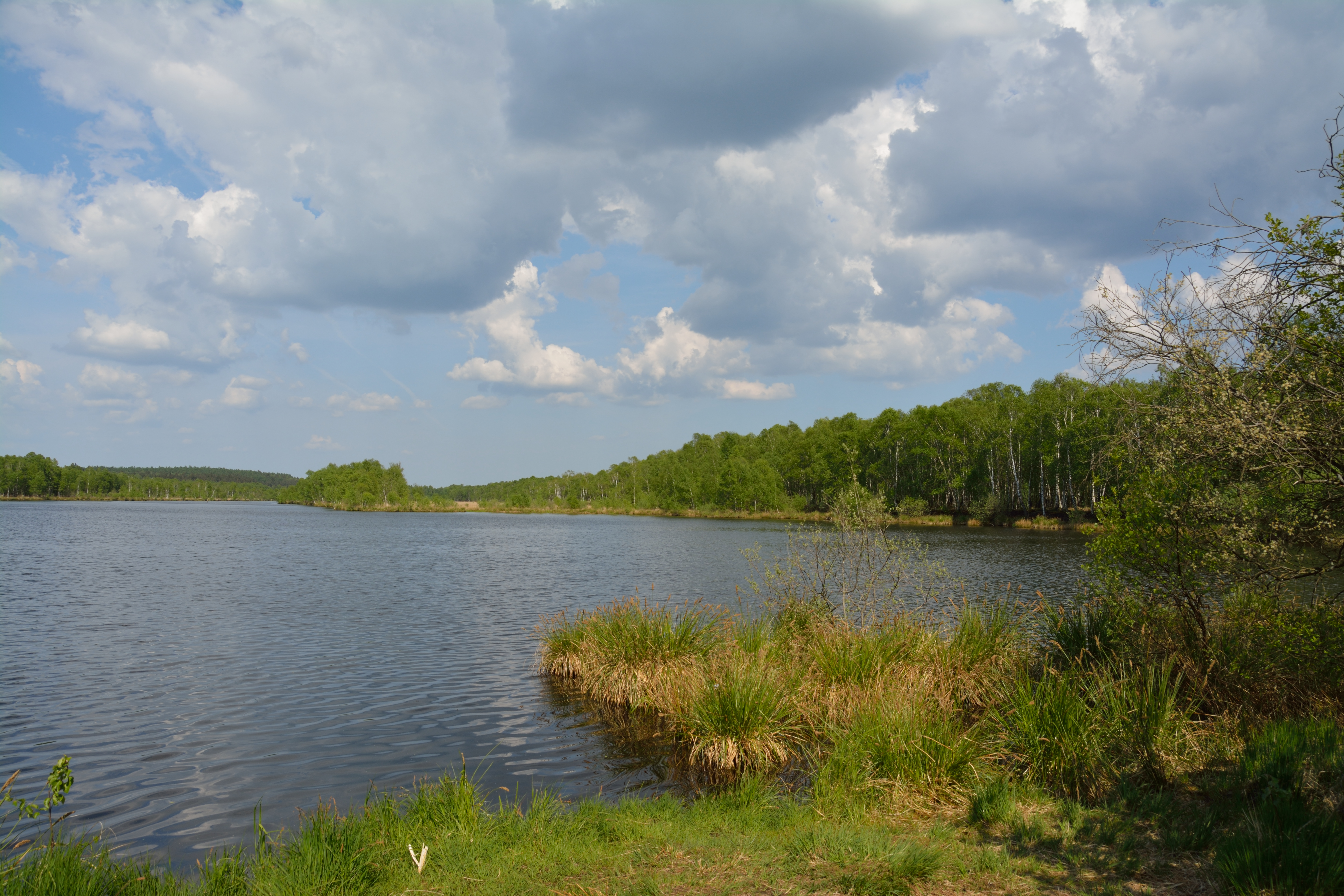 Impressionen aus dem FFH-Gebiet "Hasenmoor" im Kreis Segeberg, Schleswig-Holstein